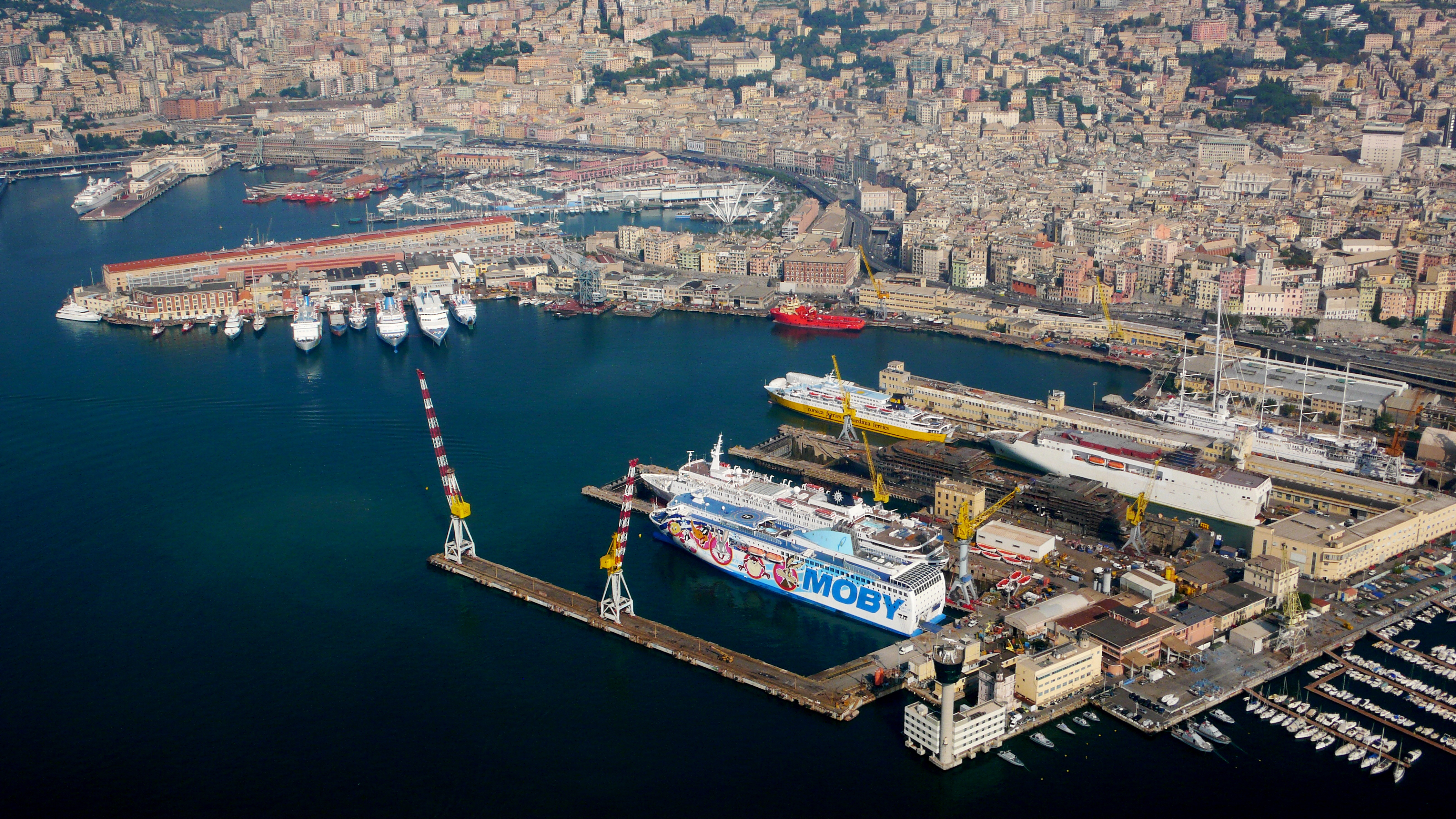 Genova Porto Storico visto dall'aereo